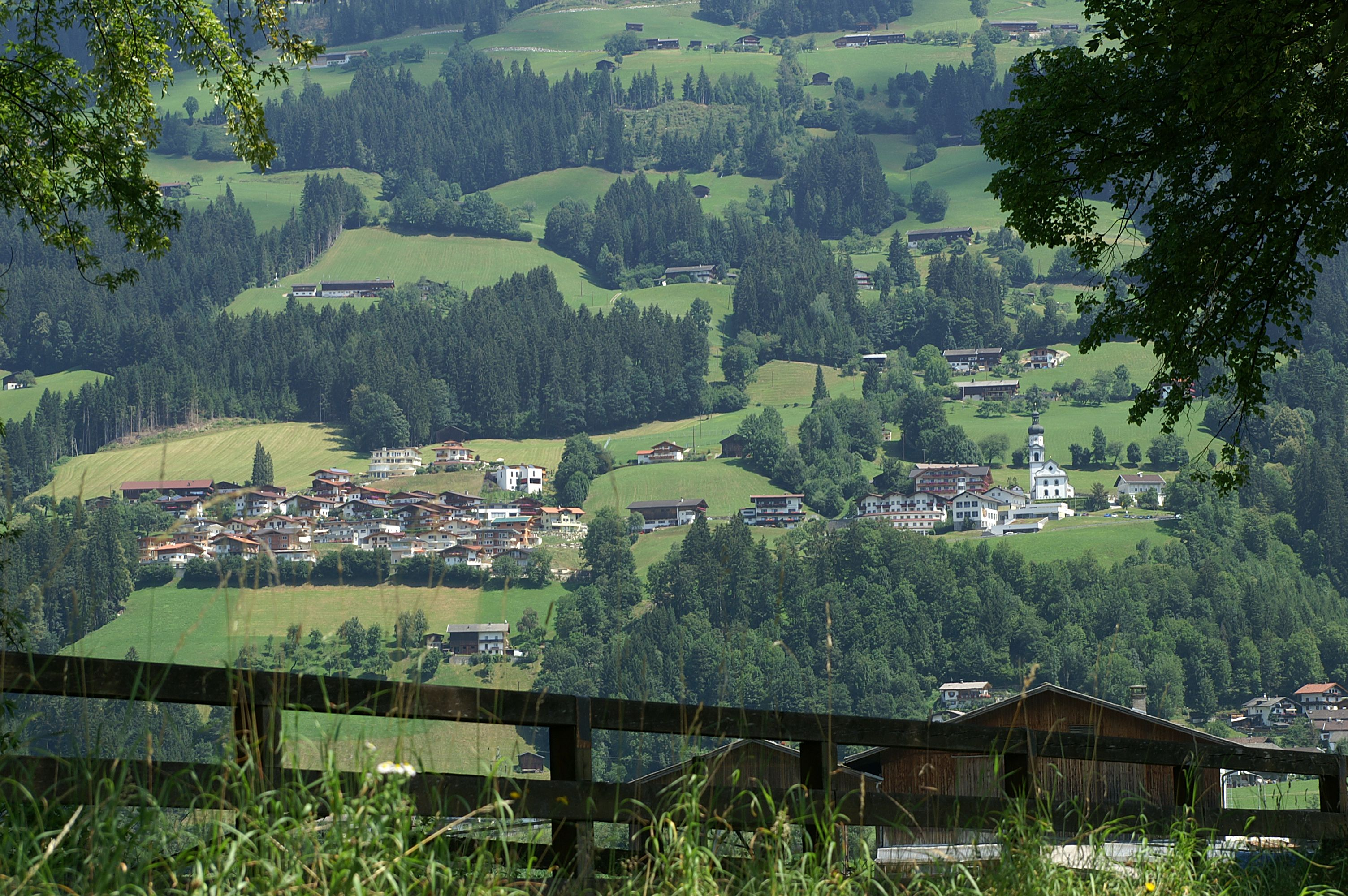 Gemeinde Hart im Zillertal, gegenüber von Fügen im Tirol